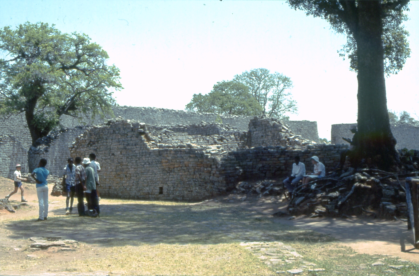 visitors in Great Zimbabwe